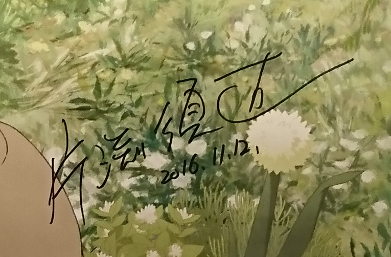 日本のアニメーション監督および脚本家の片渕須直によるサイン。映画『この世界の片隅に』の上映期間中、ユーロスペースに飾られていた映画ポスターより抜粋。片淵は監督・脚本を担当。